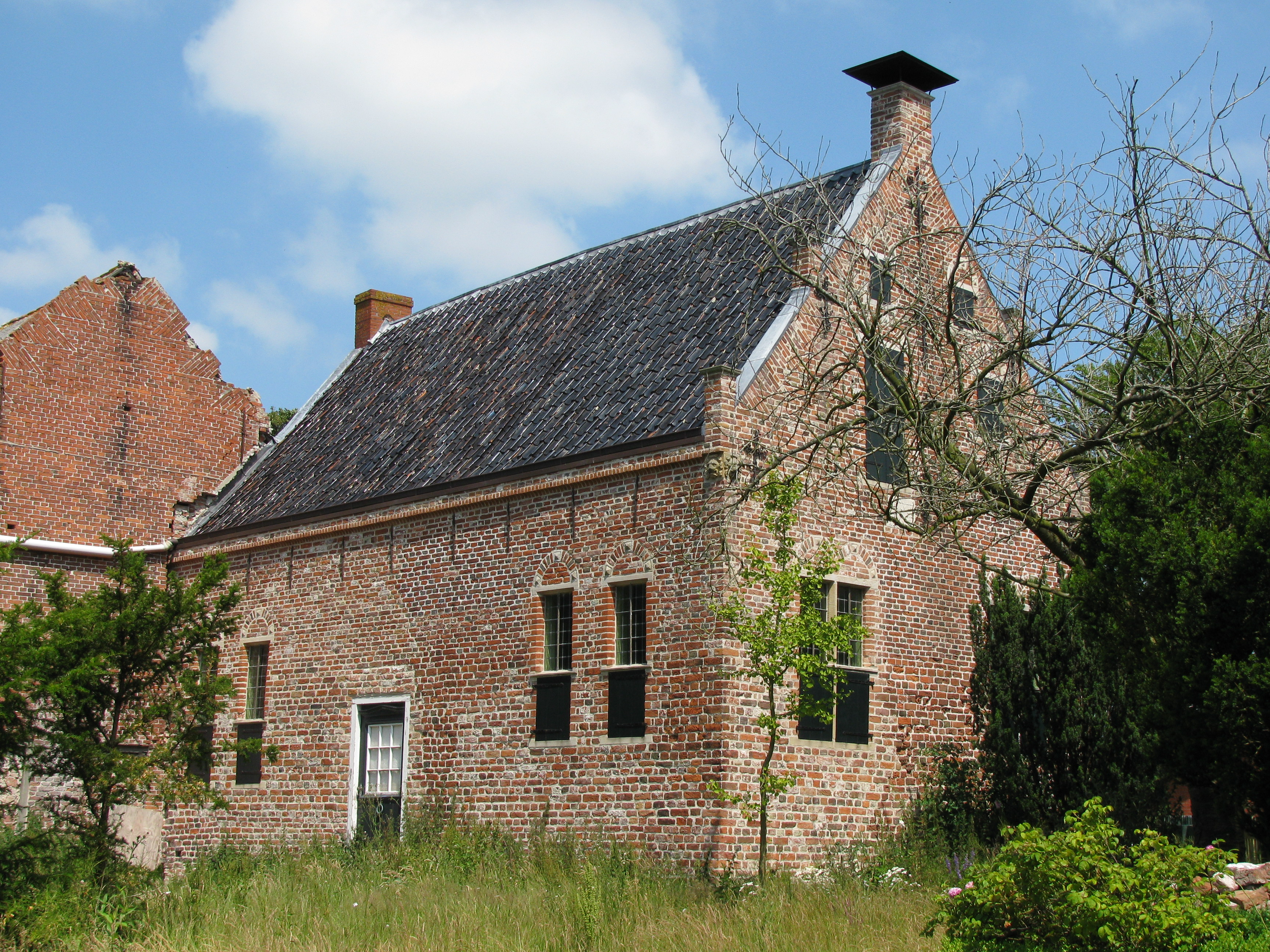 Greetsiel, Ostfriesland: Das Steinhaus, erbaut um 1600, Blick von Süden.